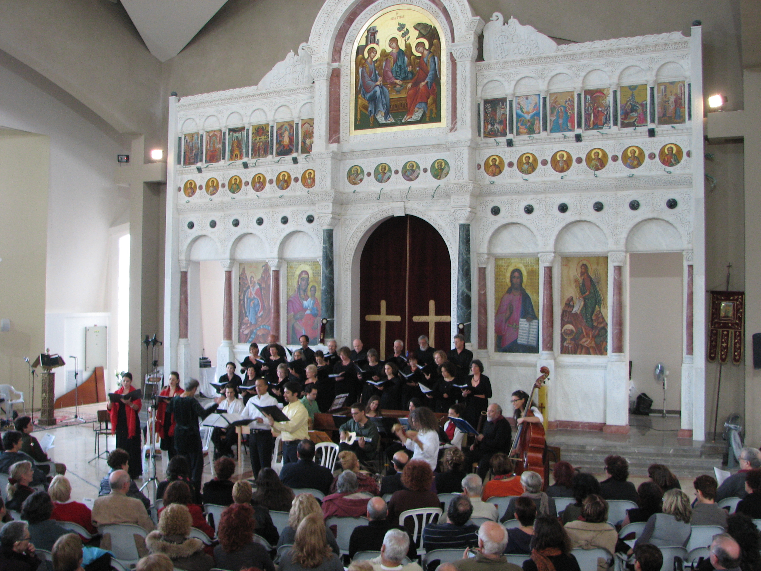 Holiday of Holidays festiva, Haifa Israel החג של החגים הוא פסטיבל הנערך בעיר חיפה מדי שנה, במהלך חודש דצמבר קונצרט של מוסיקה ליטורגית במסגרת הפסטיבל בכנסיית יוחנן המטביל - הכנסיה היוונית אורתודוכסית החדשה מוסיקה של שמש וכוכבים מגניפיקט, מיסה ומוסיקה עממית ודתית מפרו מקהלה, סולנים ואנסמבל כלים מקורי מפרו